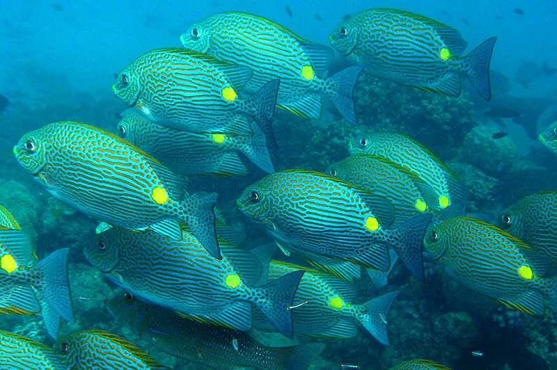 Siganus lineatus, cardumen en isla Lizard, Australia